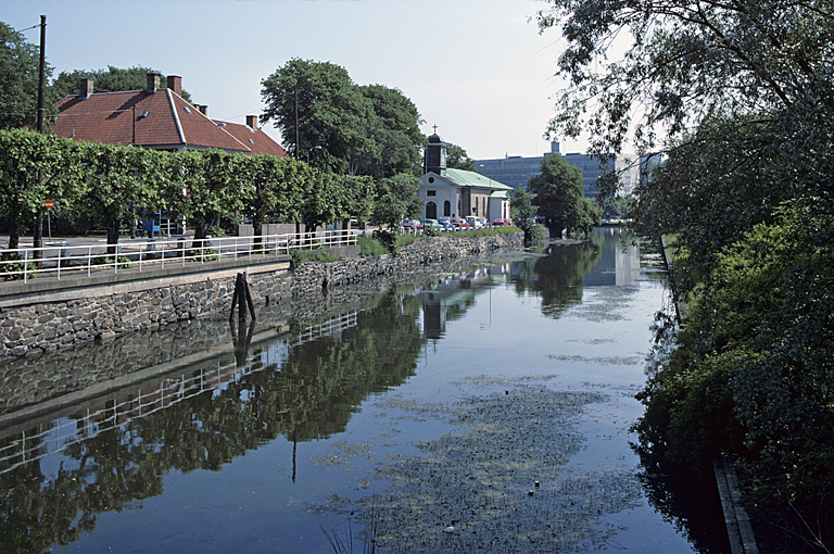 Fattighusån med Mariakyrkan (fd. Fattighuskyrkan) i bildens bortre del. Motiv: Göteborg Nyckelord: Riksintressen Kategori: Stadsmiljö Fattighusån med Mariakyrkan (fd. Fattighuskyrkan) i bildens bortre del.